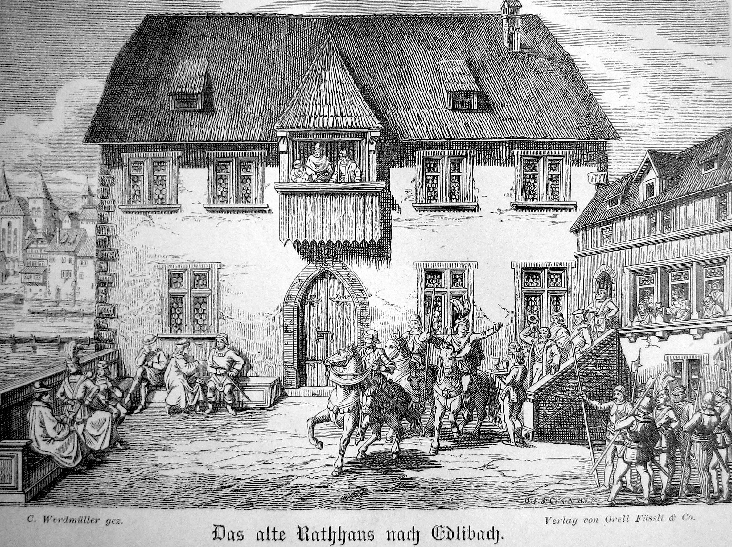 altes Zürcher Rathaus, um 1500, Zeichnung nach Gerold Edlibach von Johann Conrad Werdmüller (1819 – 1892)